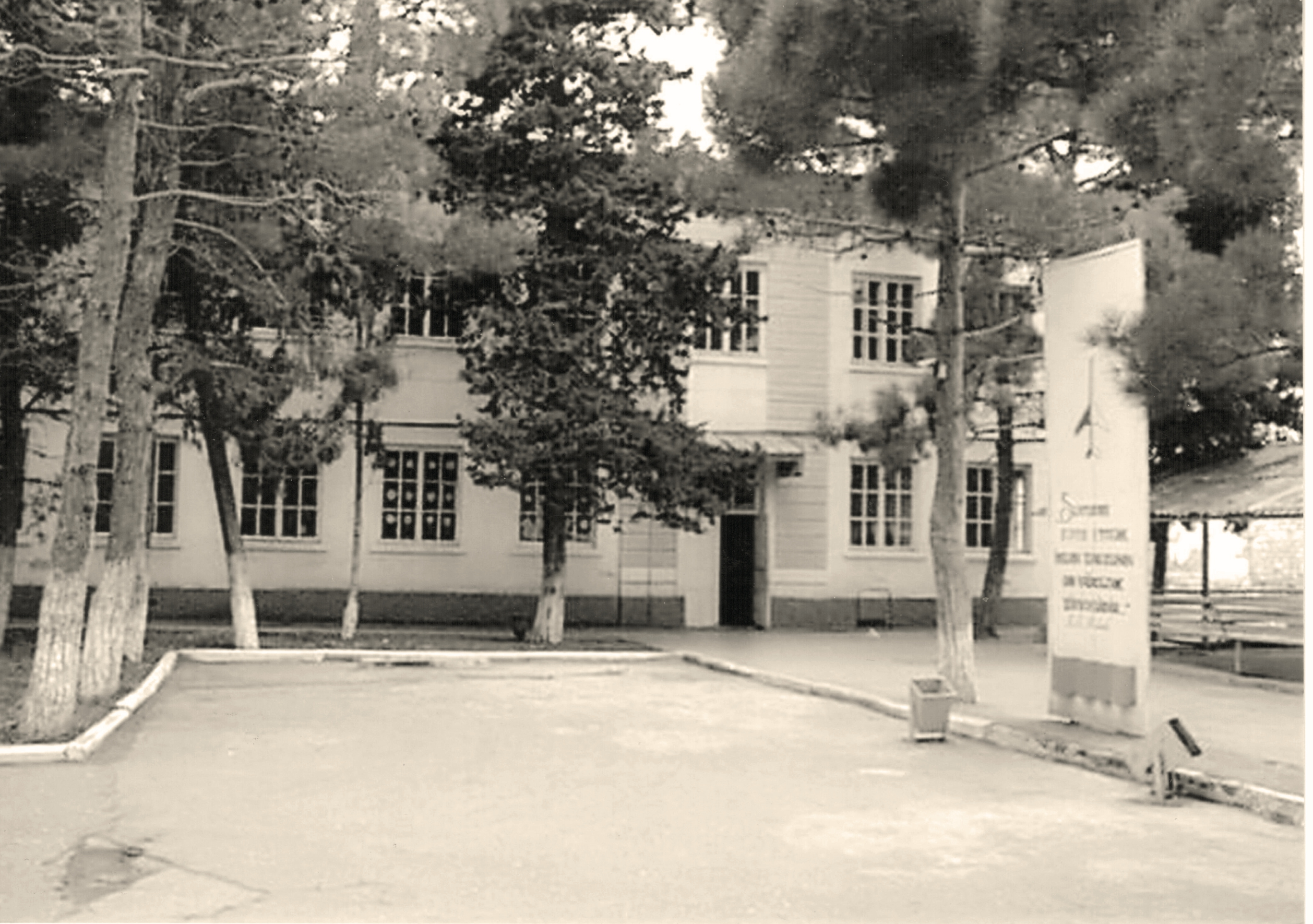 Milli Aviasiya Akademiyası, I tədris binası: arxiv